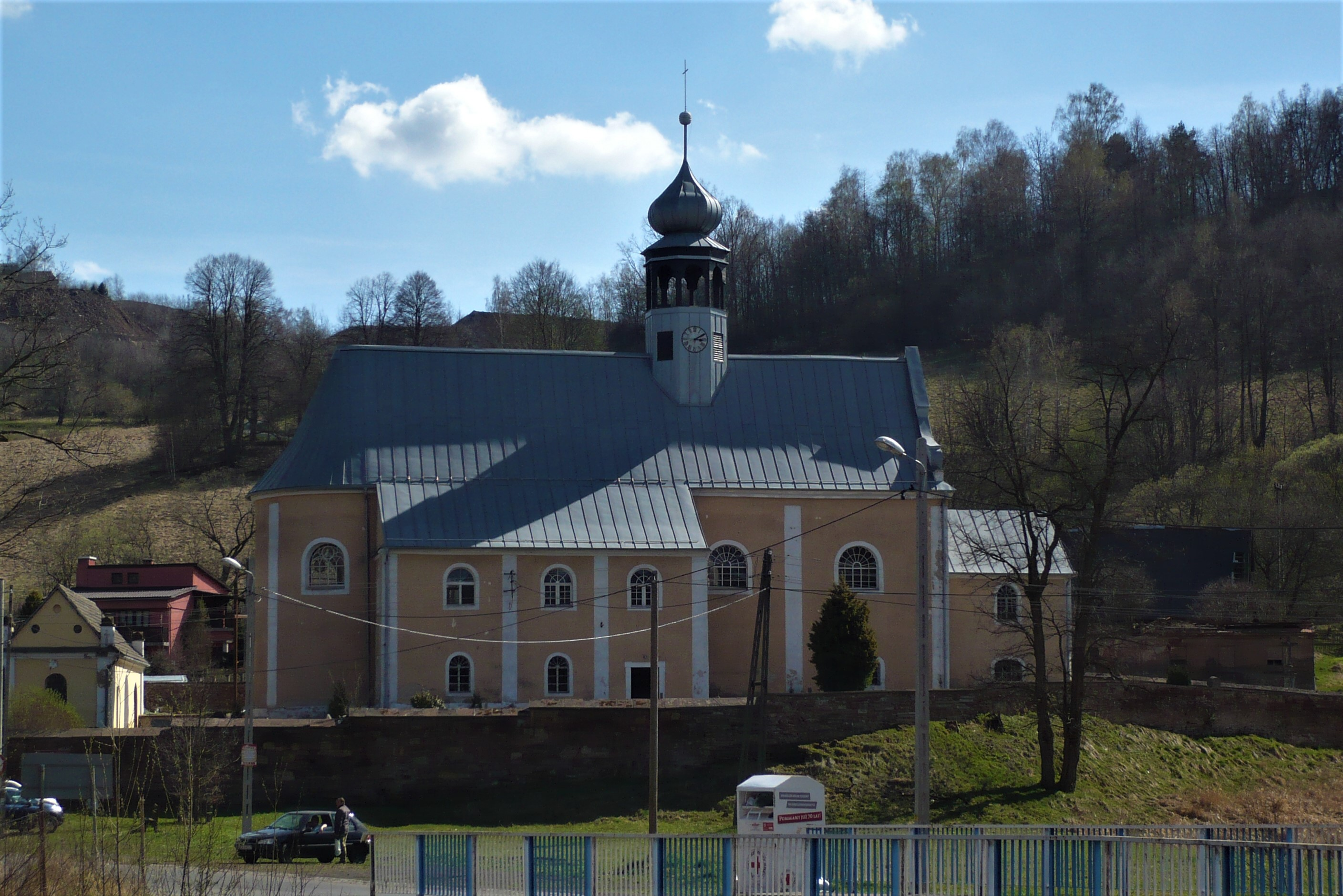 Tłumaczów - rzymskokatolicki kościół filialny pw. śś. Piotra i Pawła, XVIII, 2 poł. XIX